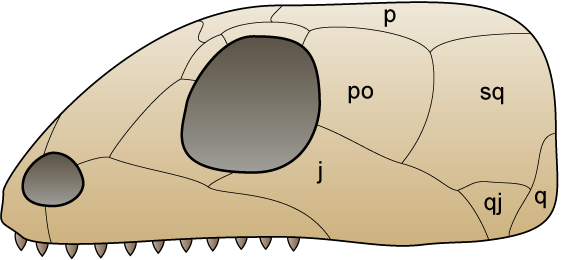 Skull of Anapsida